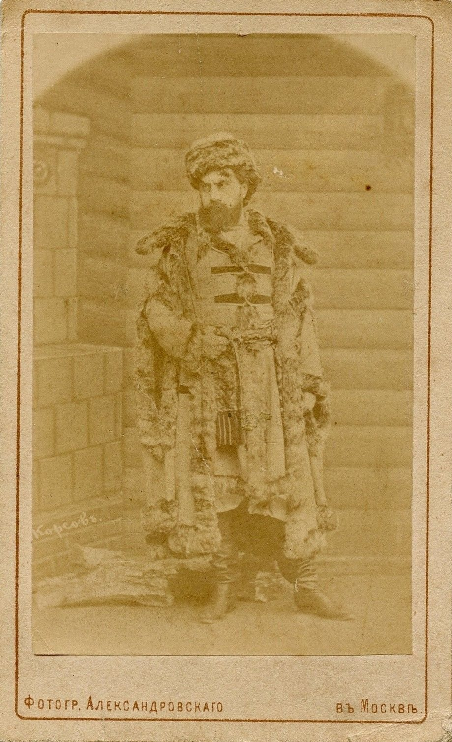 Александровский (Быков), Иван Артемьевич. Портрет Богомира Корсова. 1880-е годы